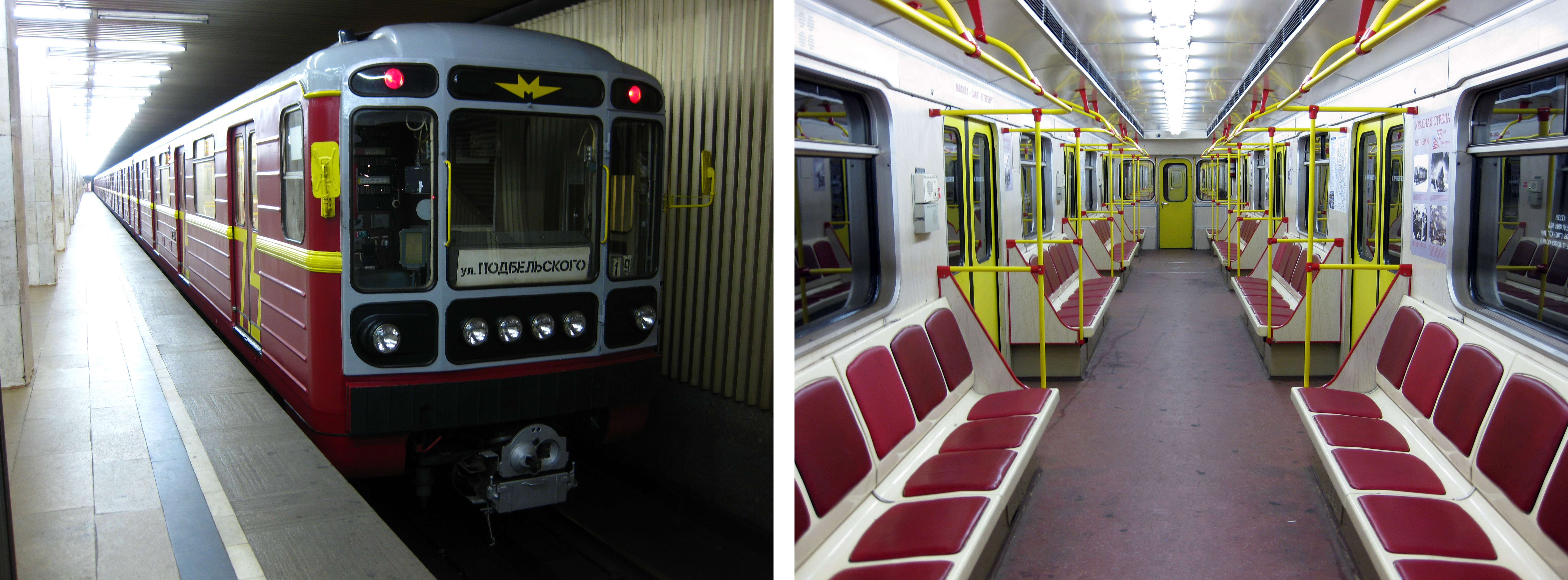 Состав «Красная стрела — 75 лет» на станции метро Бульвар Рокоссовского